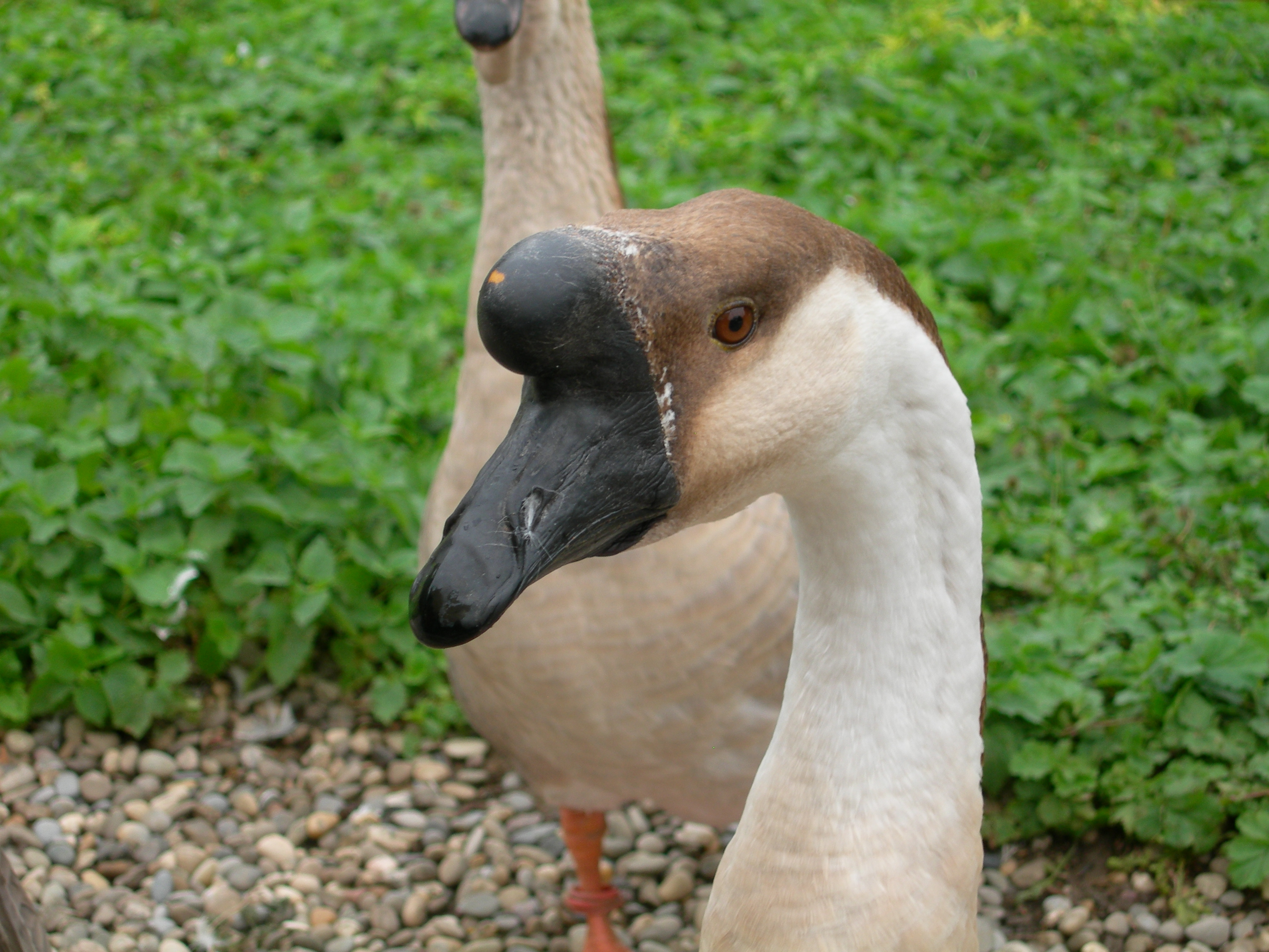 Oie de chine en parc animalier